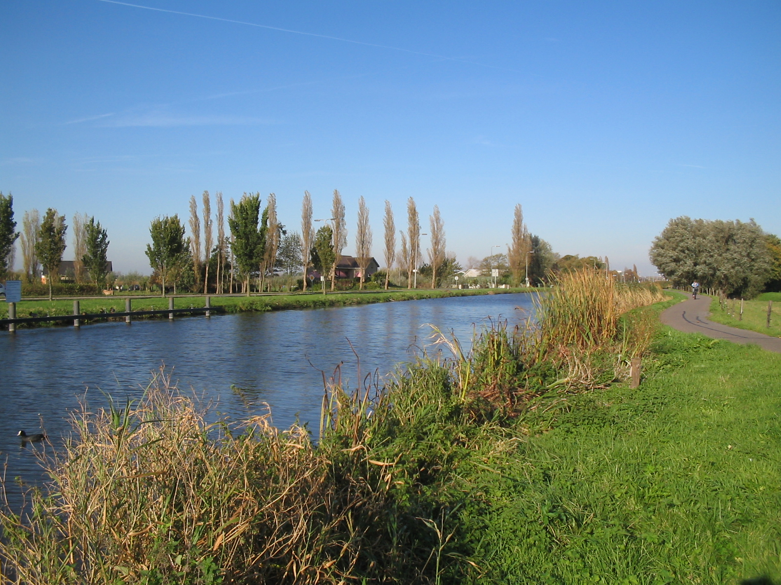 Gaag bij Schipluiden, 27 oktober 2005